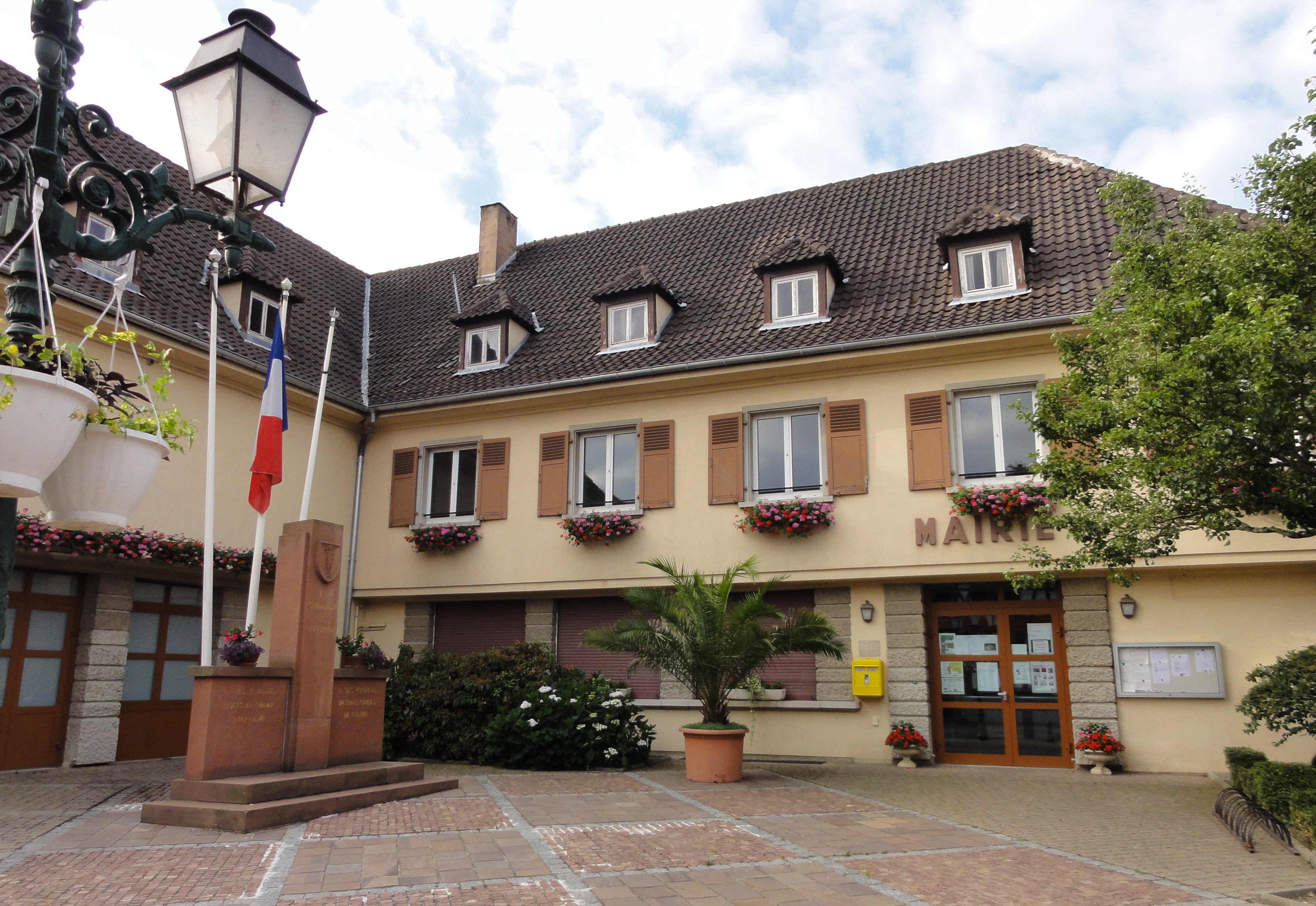 Alsace, Bas-Rhin, Surbourg, Mairie, 2 rue du Général-de-Gaulle.